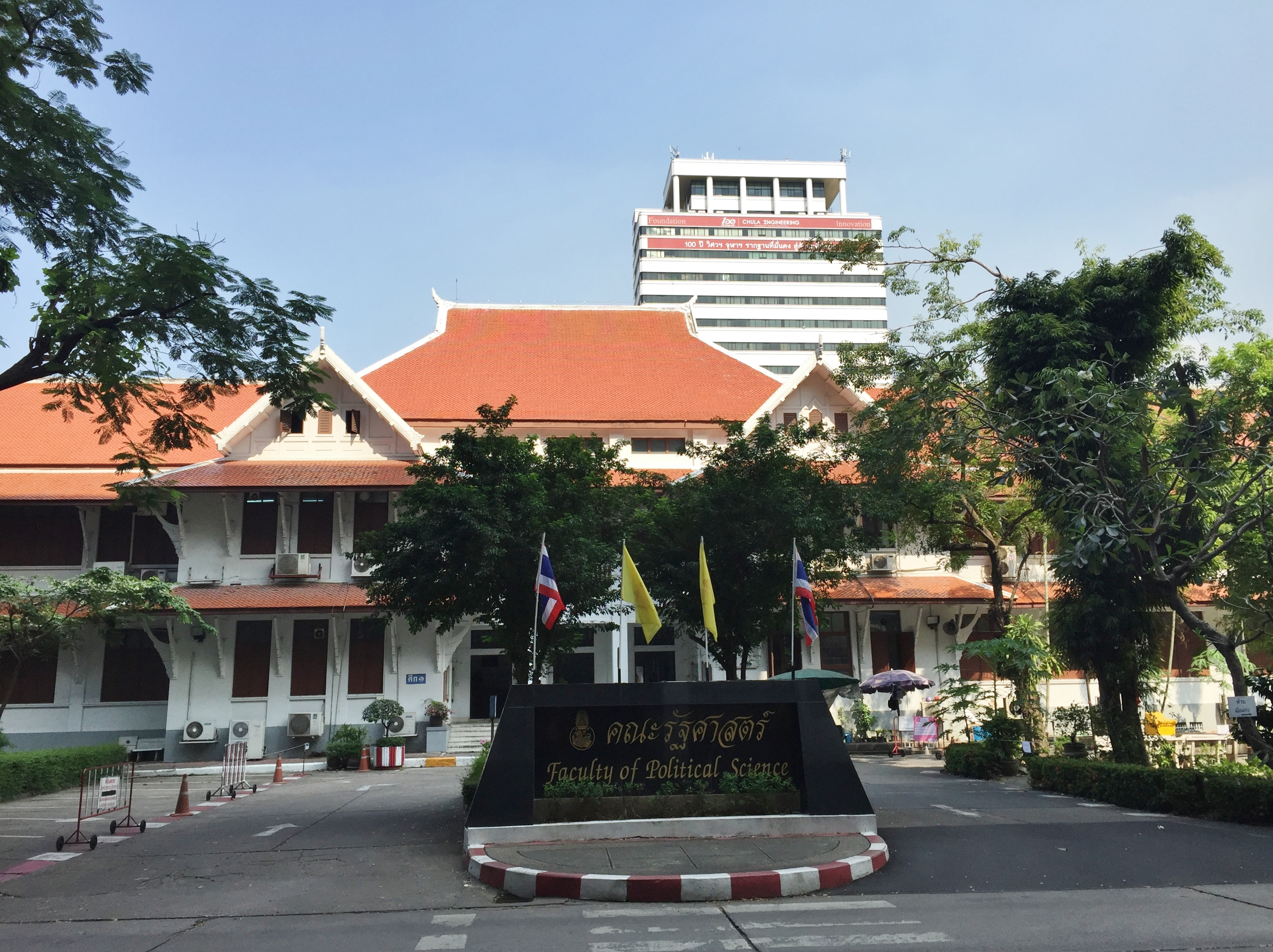 ป้ายคณะรัฐศาสตร์ จุฬาลงกรณ์มหาวิทยาลัย และอาคารสำราญราษฎร์บริรักษ์